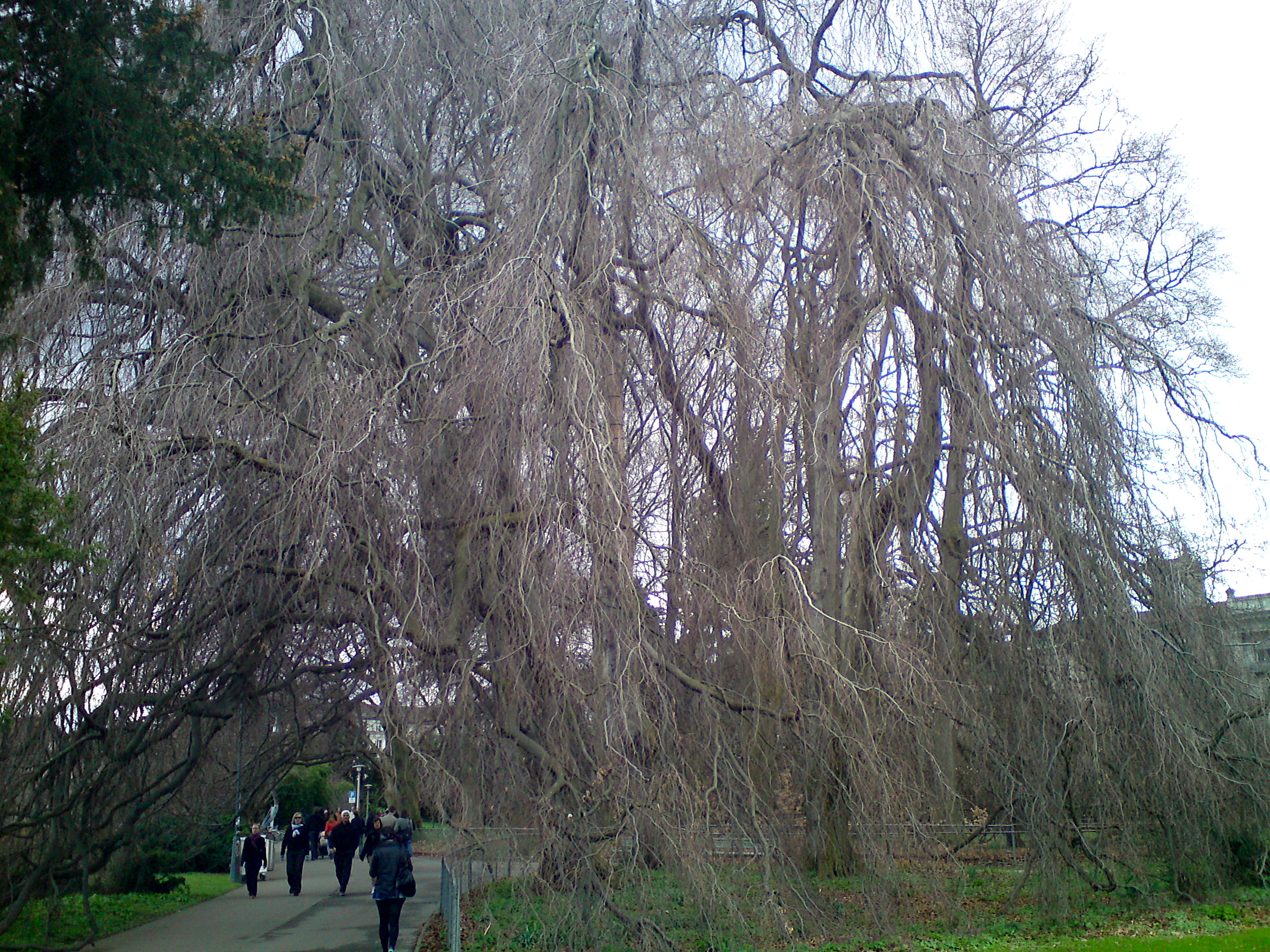 Fagus sylvatica Pendula im Arboretum Zuerich